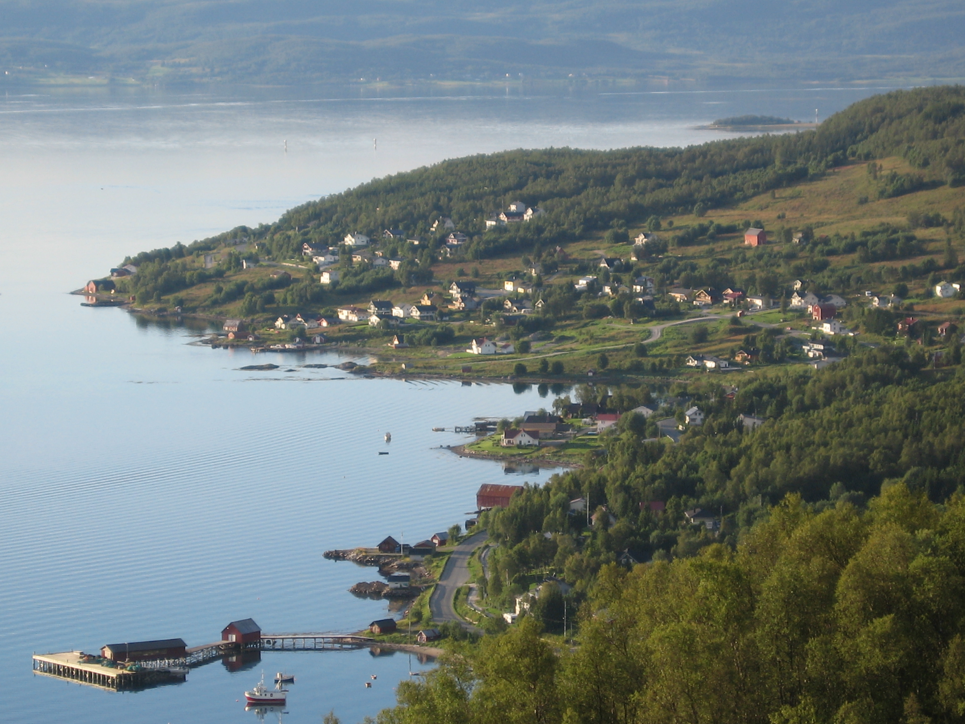 Trollvik sett fra Litlevannet, Finnsnesmarka